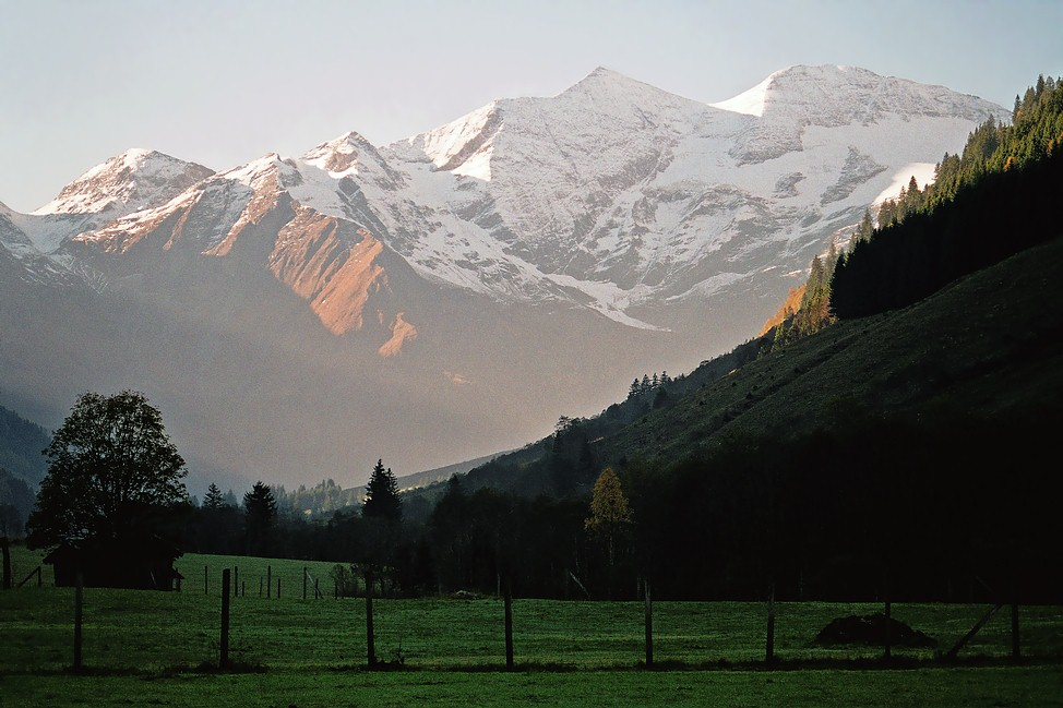 Masiv Fuscherkarkopf od Ferleiten. Vysoké Taury.